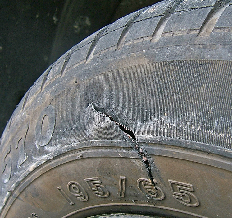 Geplatzter Reifen